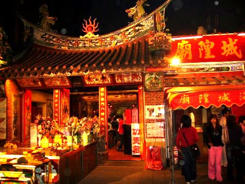 臺北霞海城隍廟。